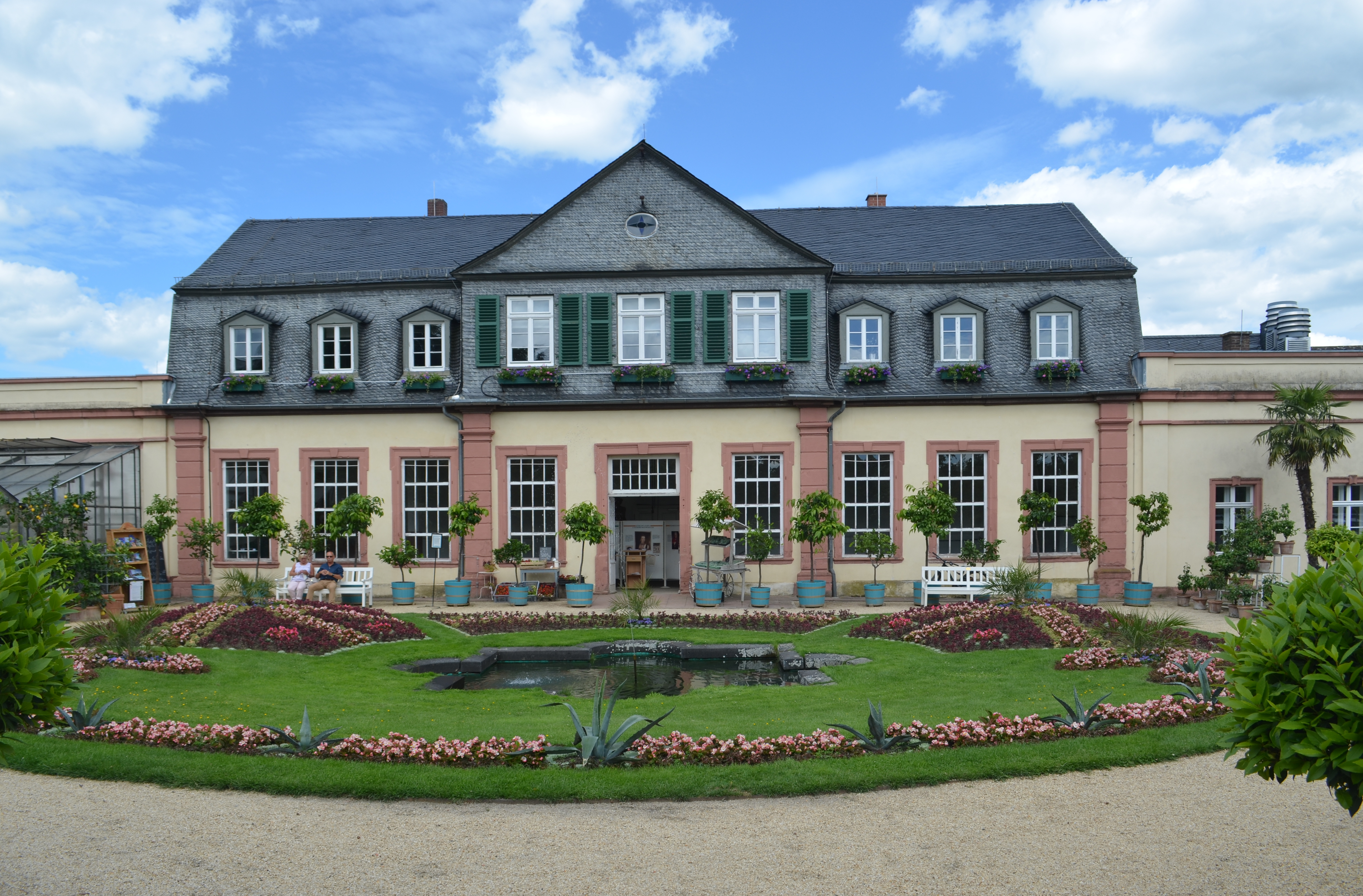 Bad Homburg, Schloss, Orangerie